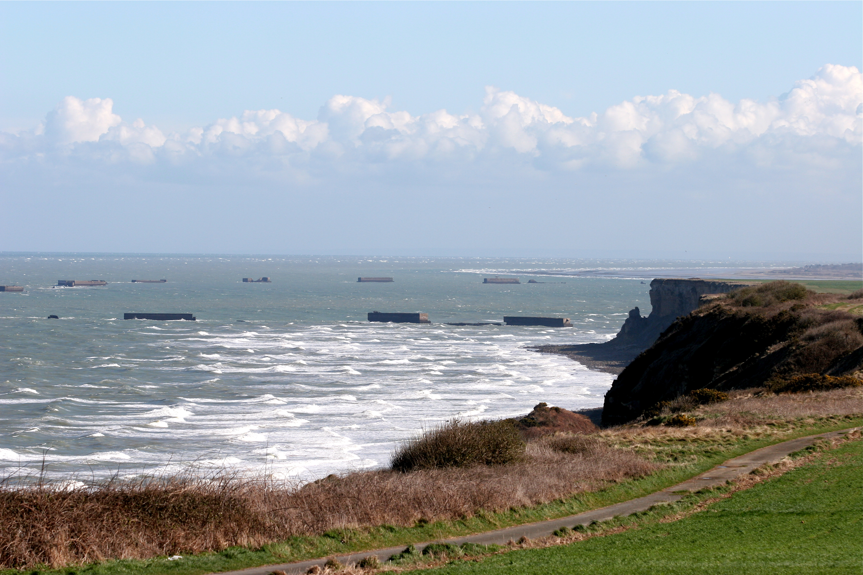 Restes du port artificiel d'Arromanches (Port Winston) vus depuis la falaise de Longues sur Mer, Calvados, France